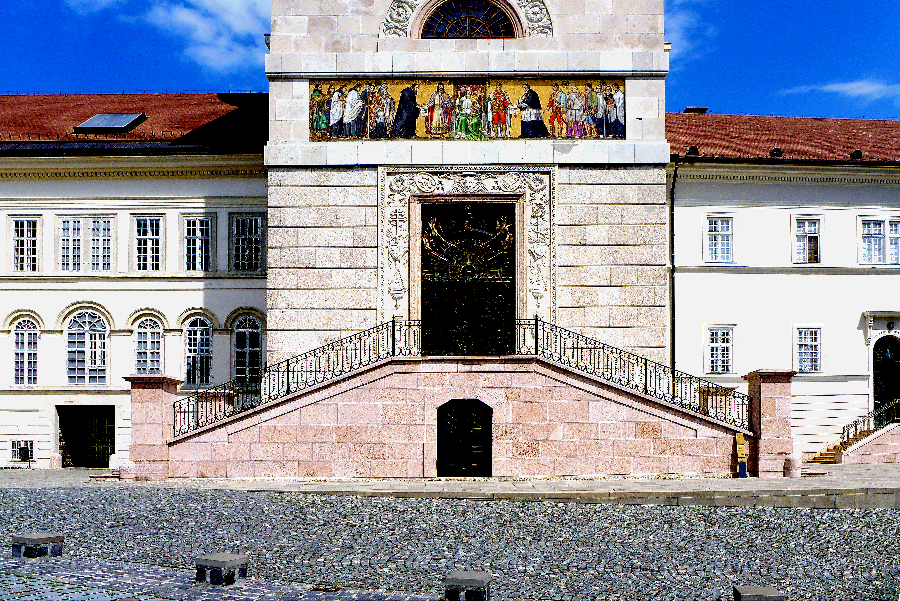 Mozaikfríz a pannonhalmi főapátság udvarában